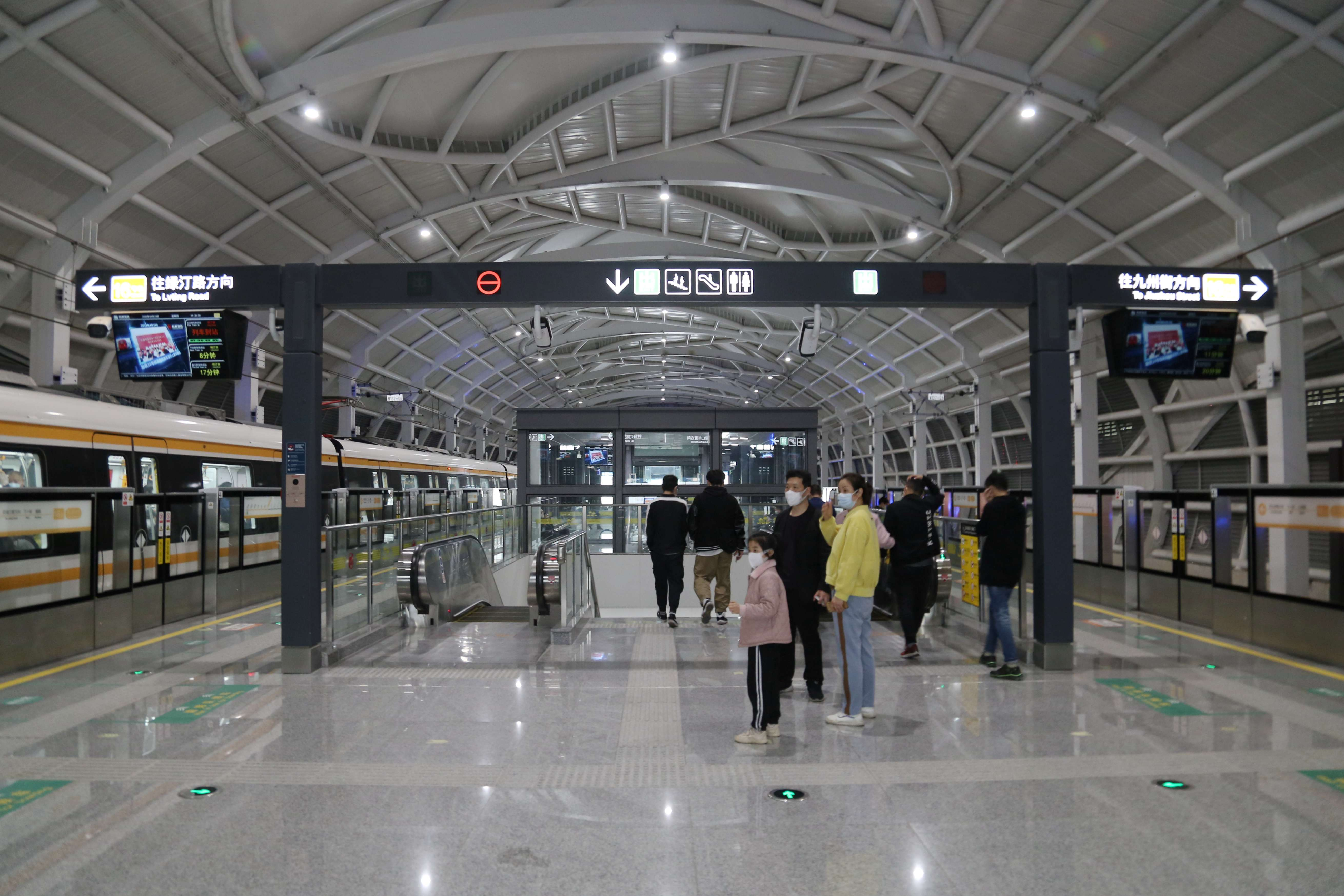 青山湖科技城站站台